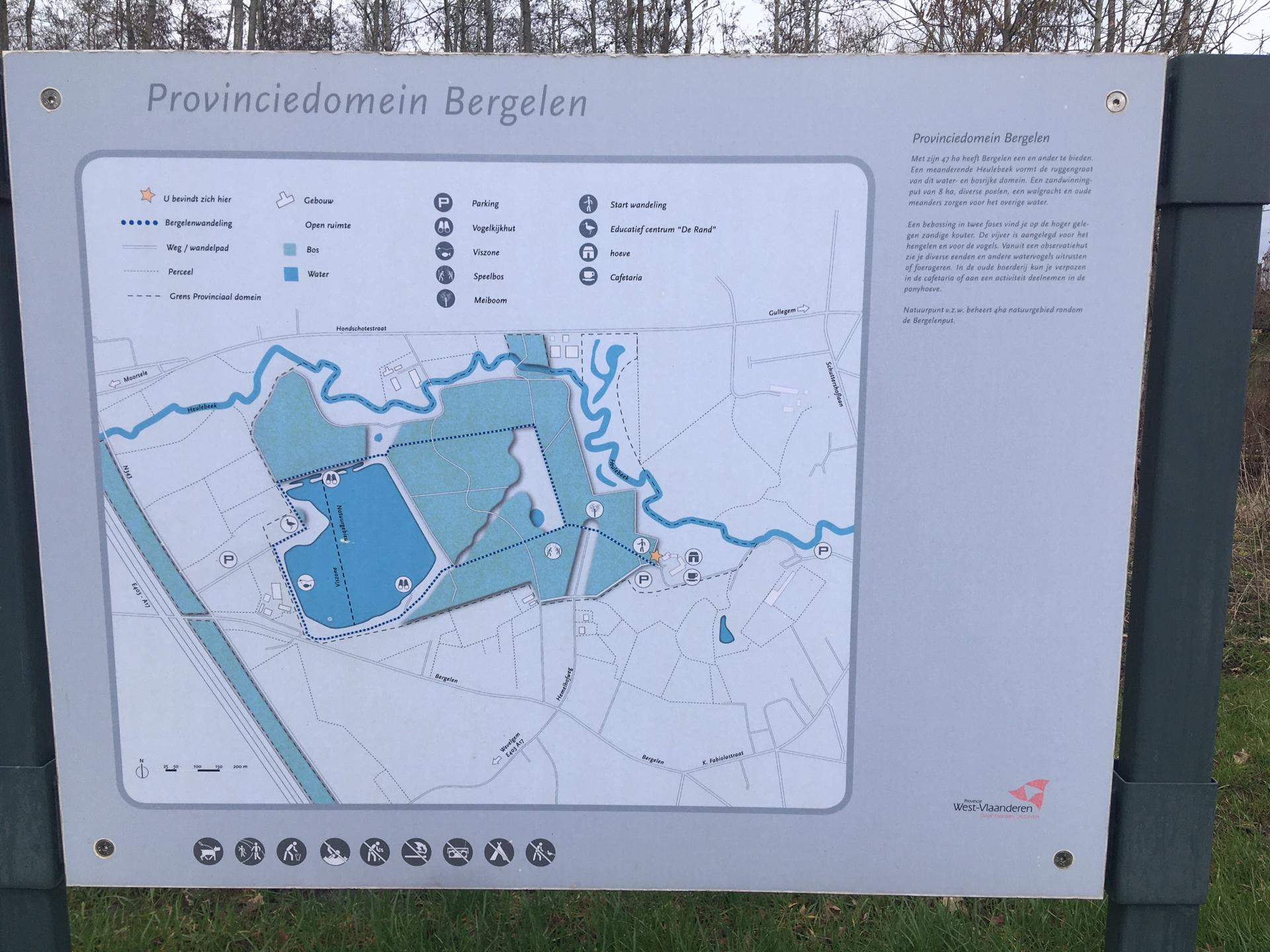 Bord Provinciedomein bergelen.